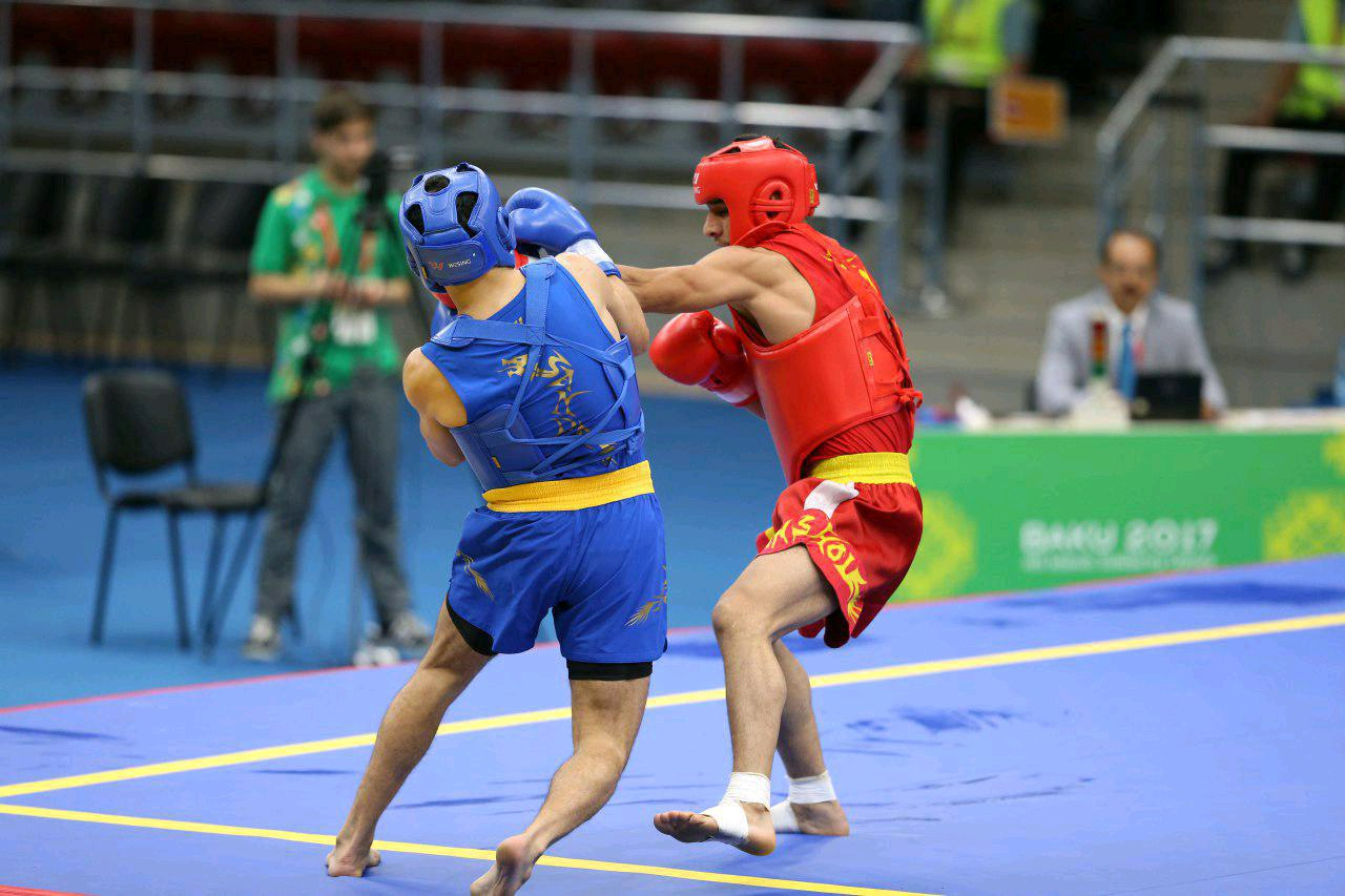 مسابقه ی ساندا